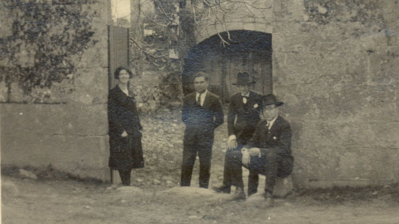 Ben-Cho-Shey, Vicente Risco e Ramón Otero Pedrayo, no pazo Gaión de Trasalba, durante a viaxe que fixeron ao Santuario de Santo André de Teixido en 1927